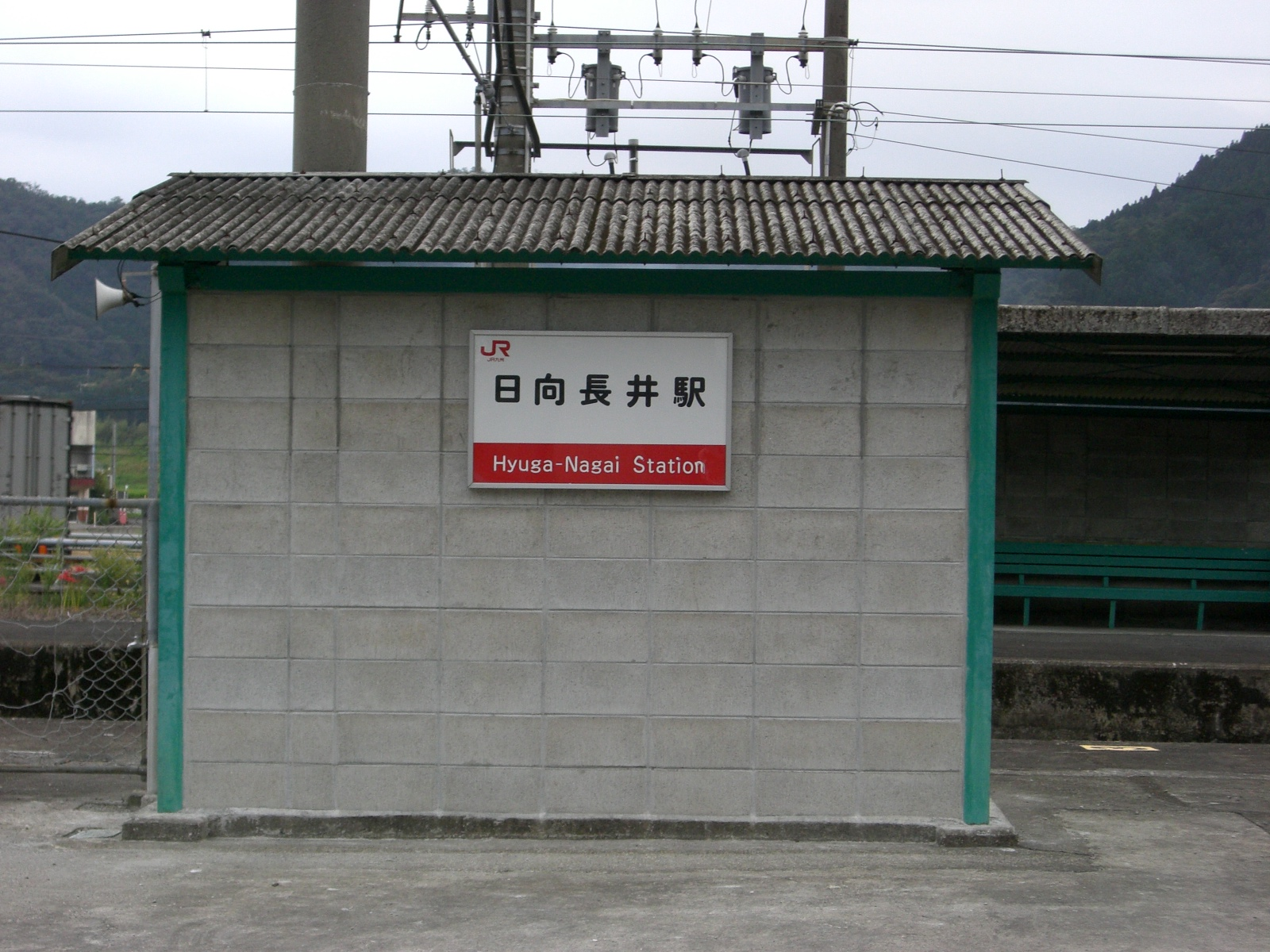 九州旅客鉄道日豊本線日向長井駅駅舎